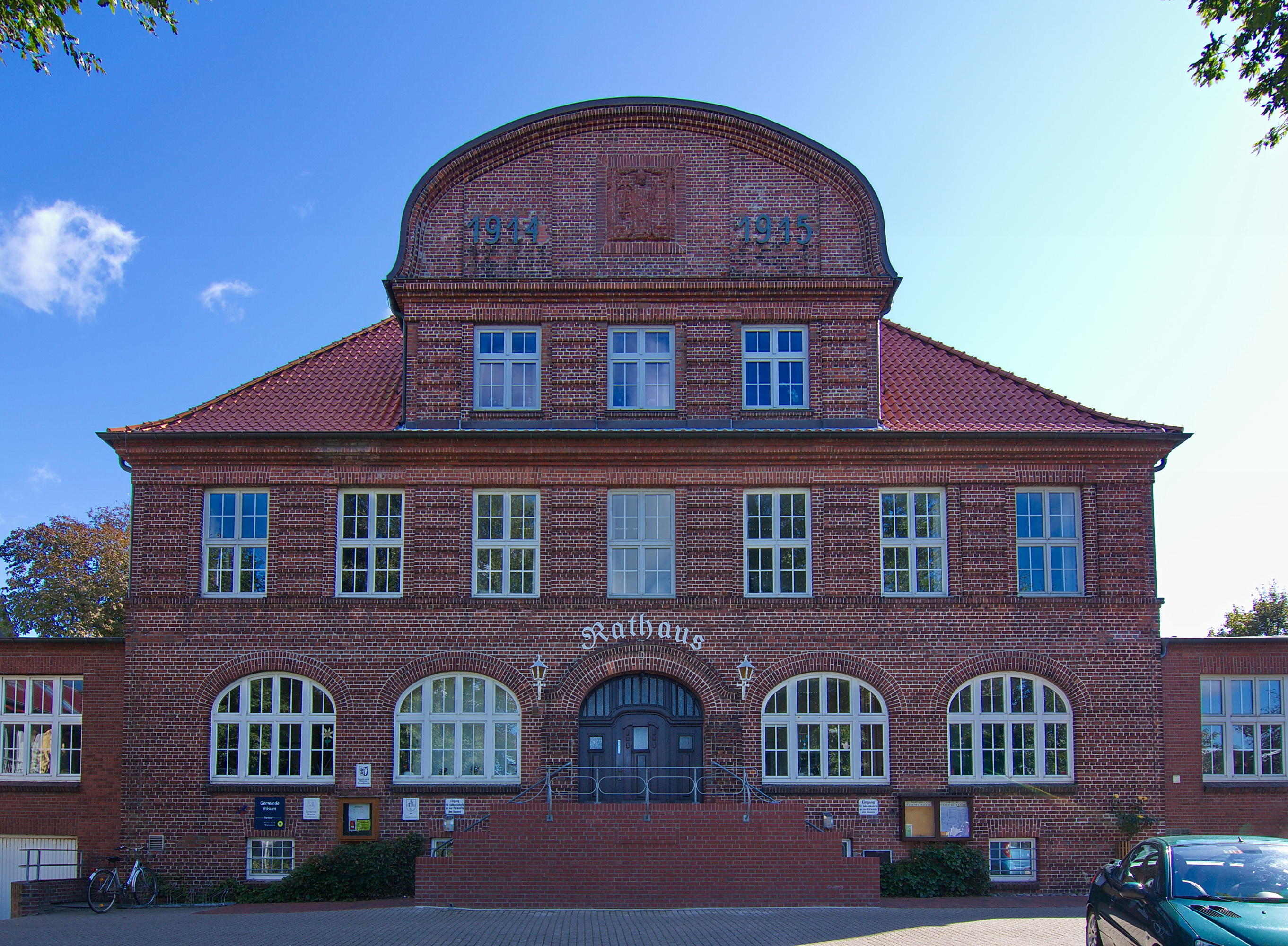 Rathaus von 1915 in Büsum, Schleswig-Holstein, Deutschland.